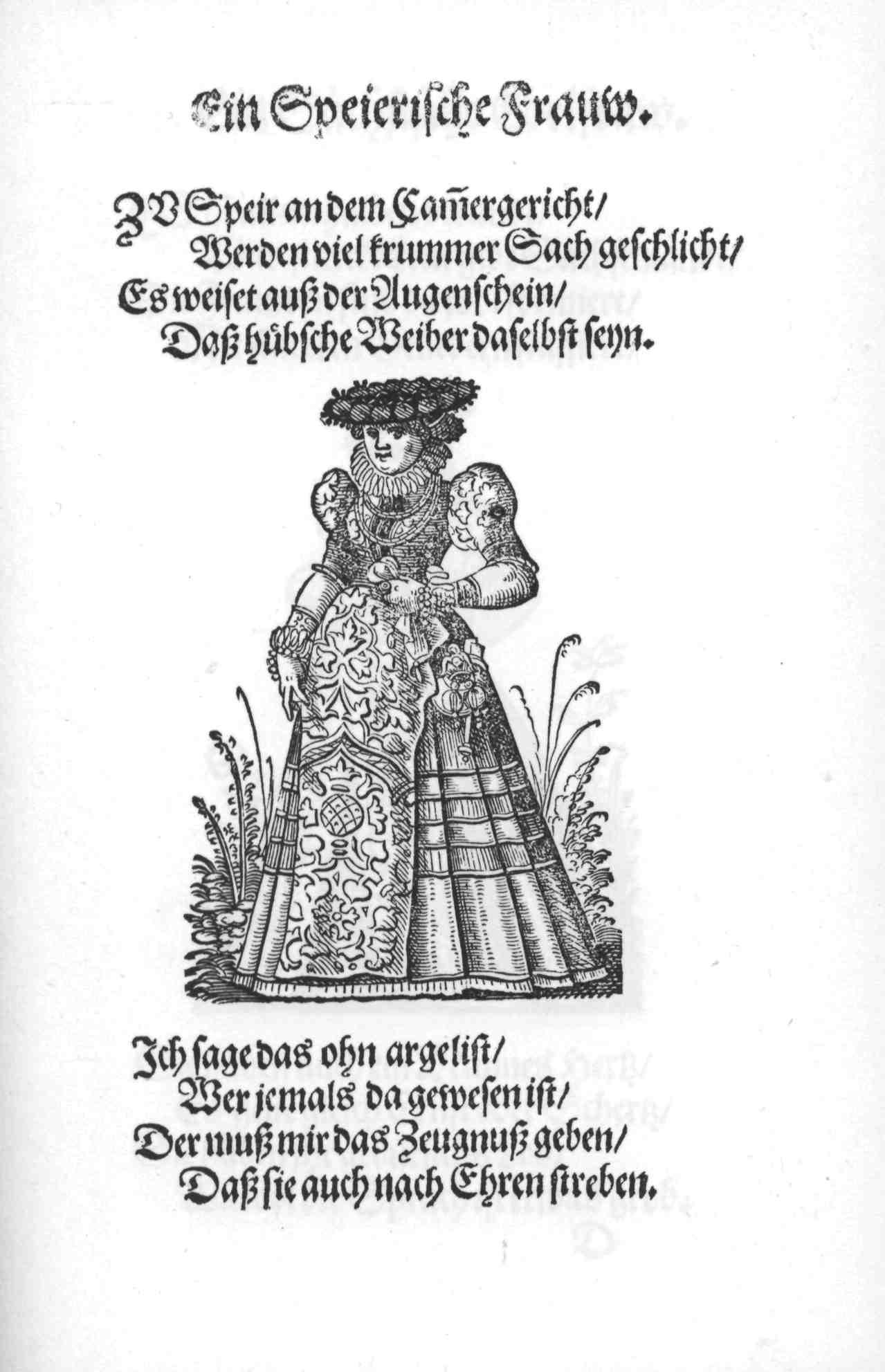 Ein Speierische Frauw. Page from: Im Frauwenzimmer Wirt vermeldt von allerley schönen Kleidungen vnnd Trachten der Weiber (= Frauen-Trachtenbuch), Getruckt zu Franckfurt am Mayn in Verlegung Sigmund Feyrabends, 1586